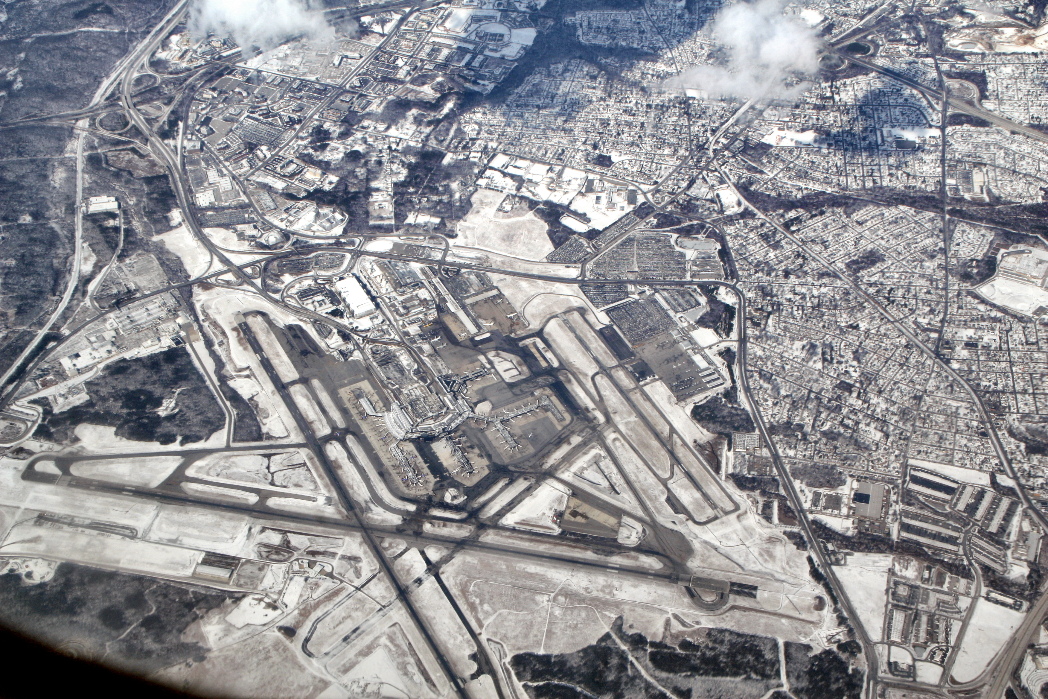 BWI.